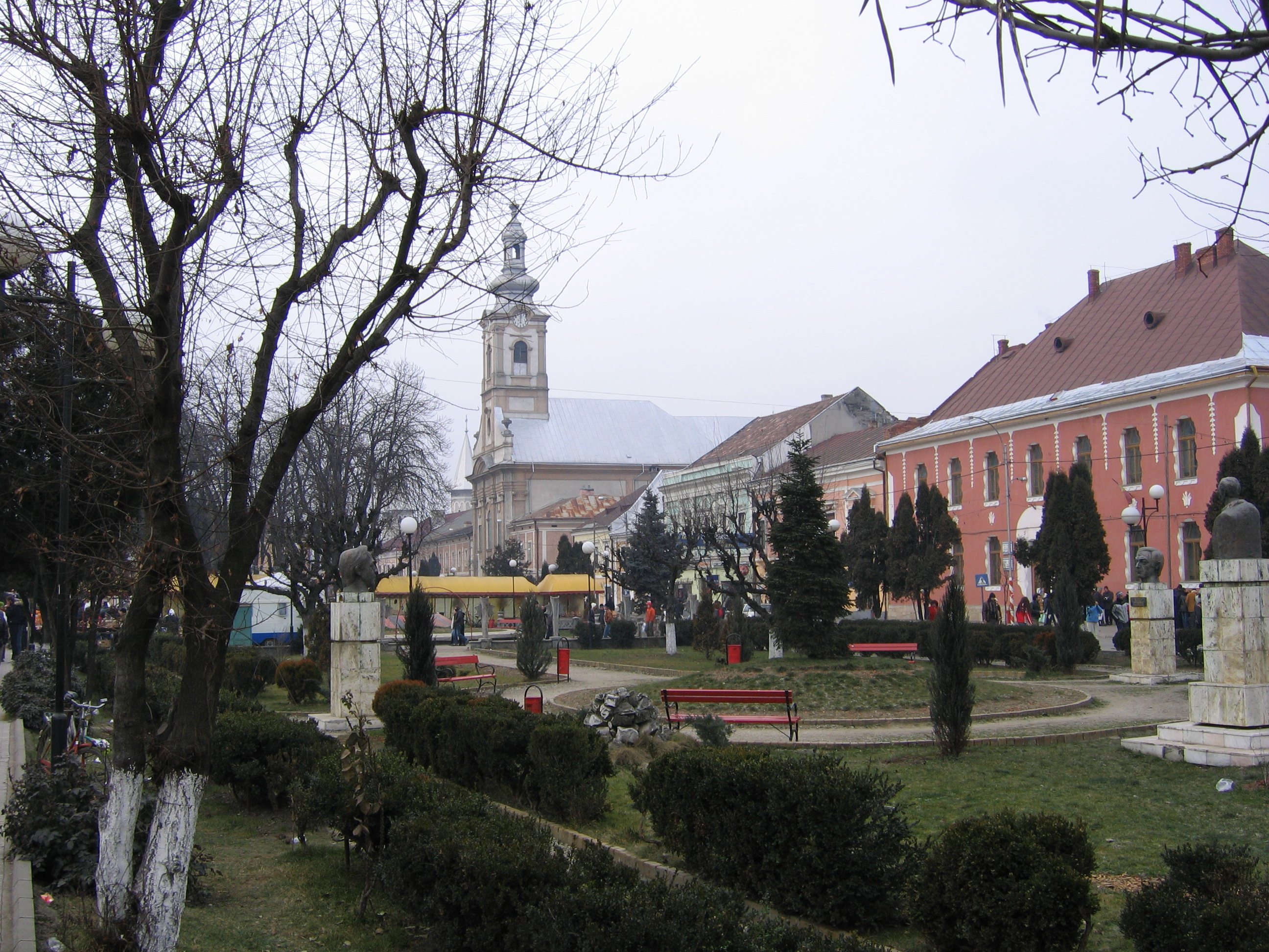 Park im Zentrum von Sighet